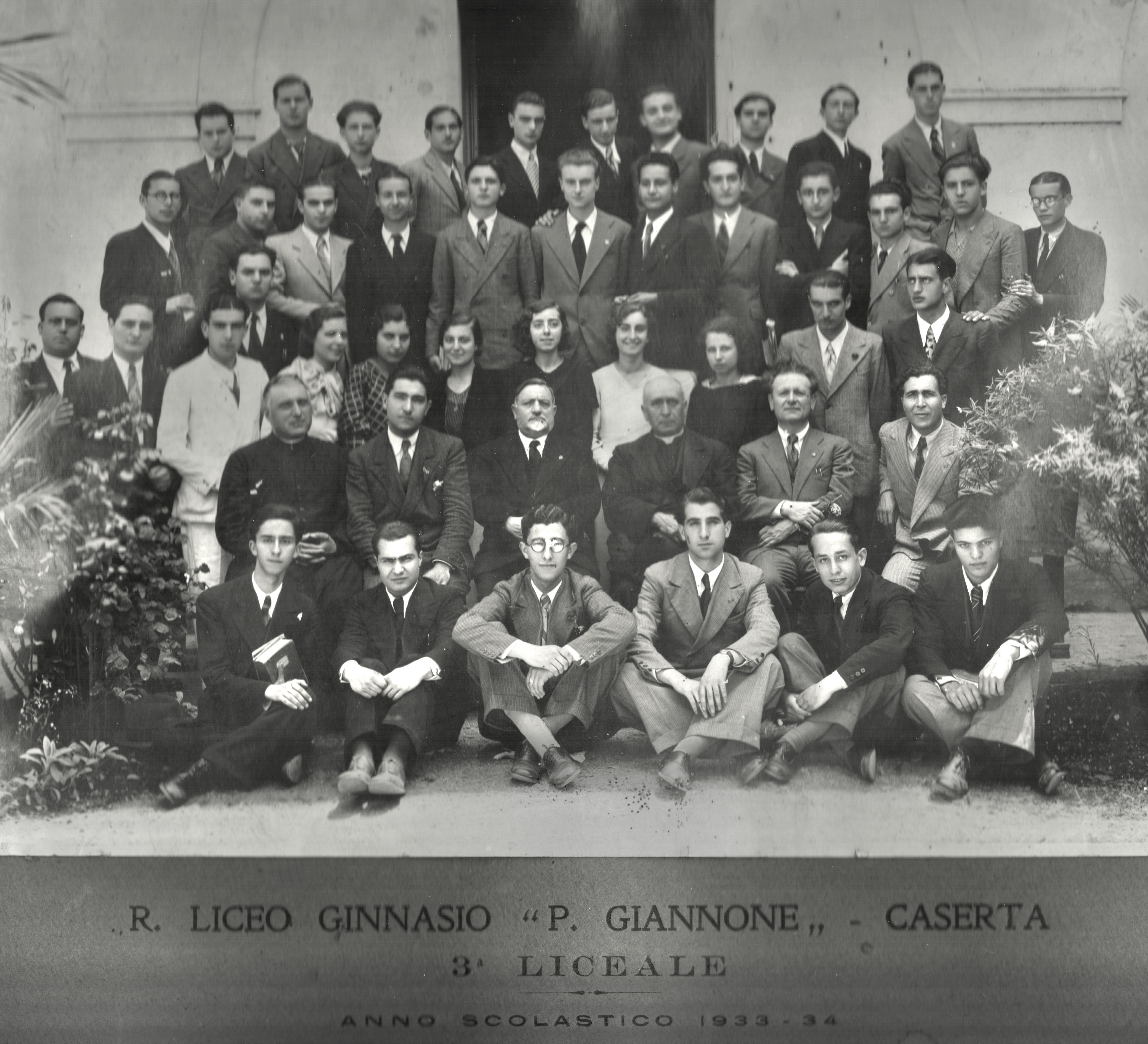 Al centro della foto, col "pizzetto", il preside Francesco Fava; alla sua sinistra (destra per chi guarda) il prof. Gabriele Fusco, titolare di Lettere italiane e latine; al suo fianco il prof. Vittorio Colla, insegnante di Greco.